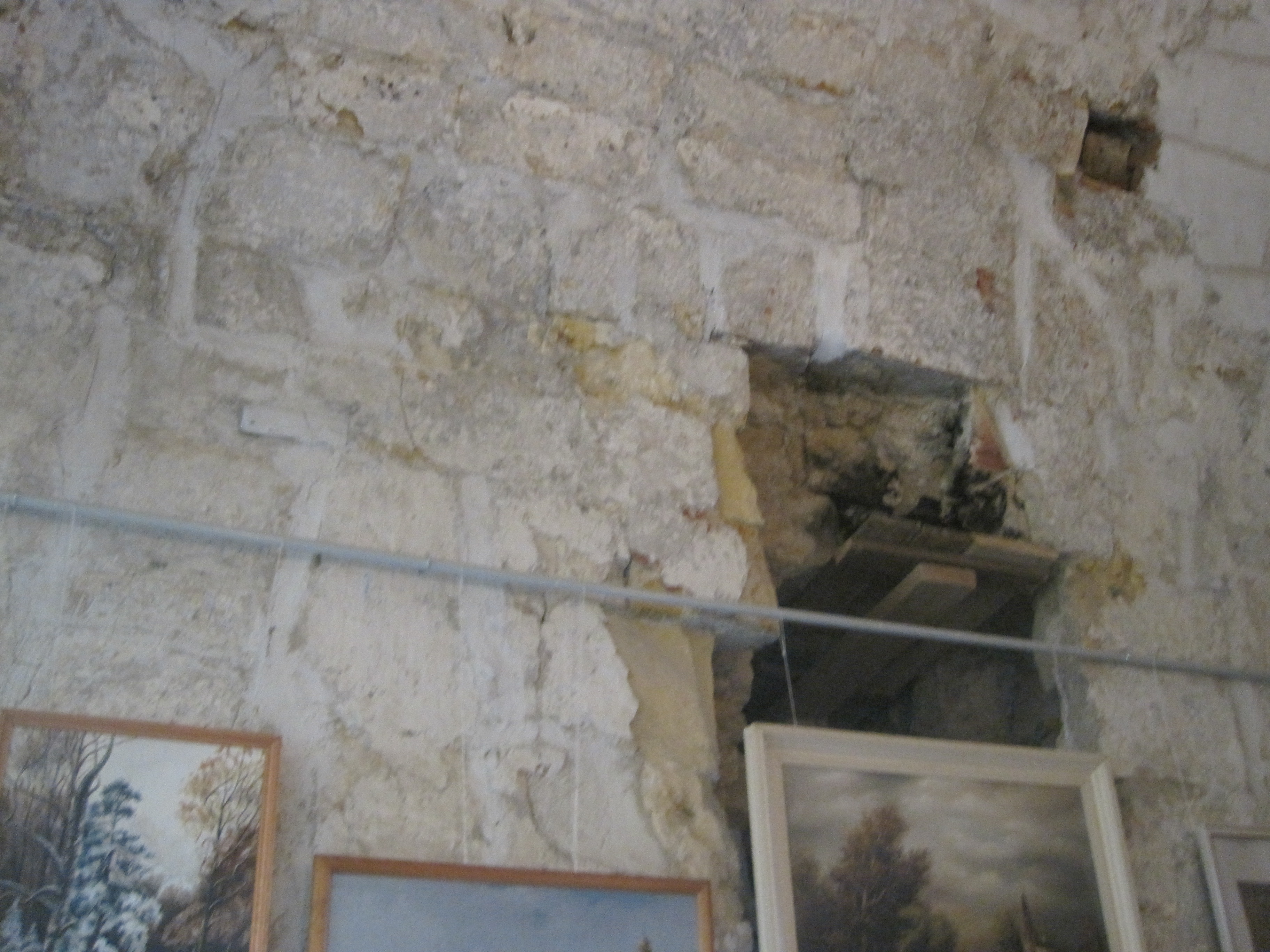 Кремлевские ворота